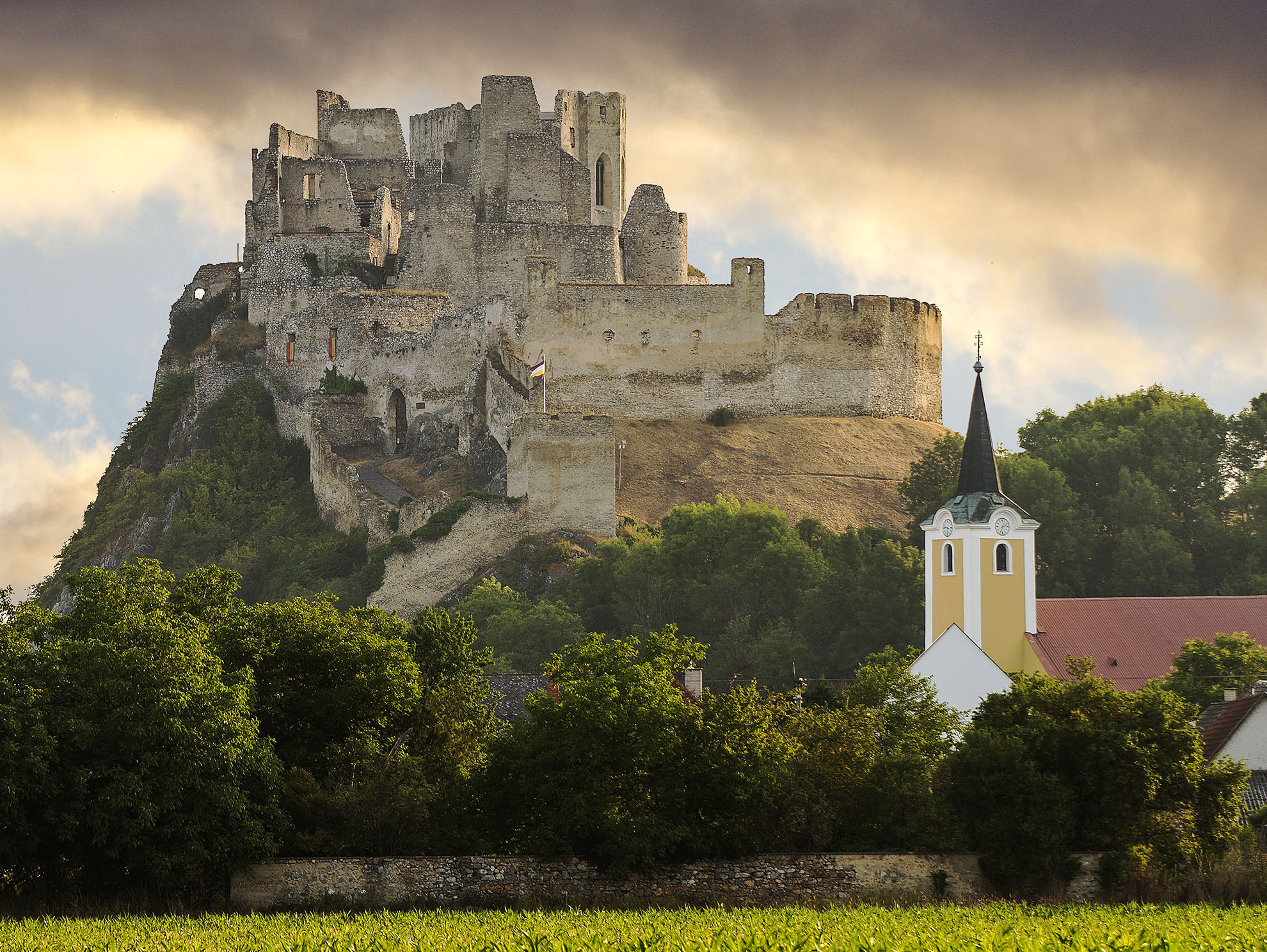 Hrad Beckov